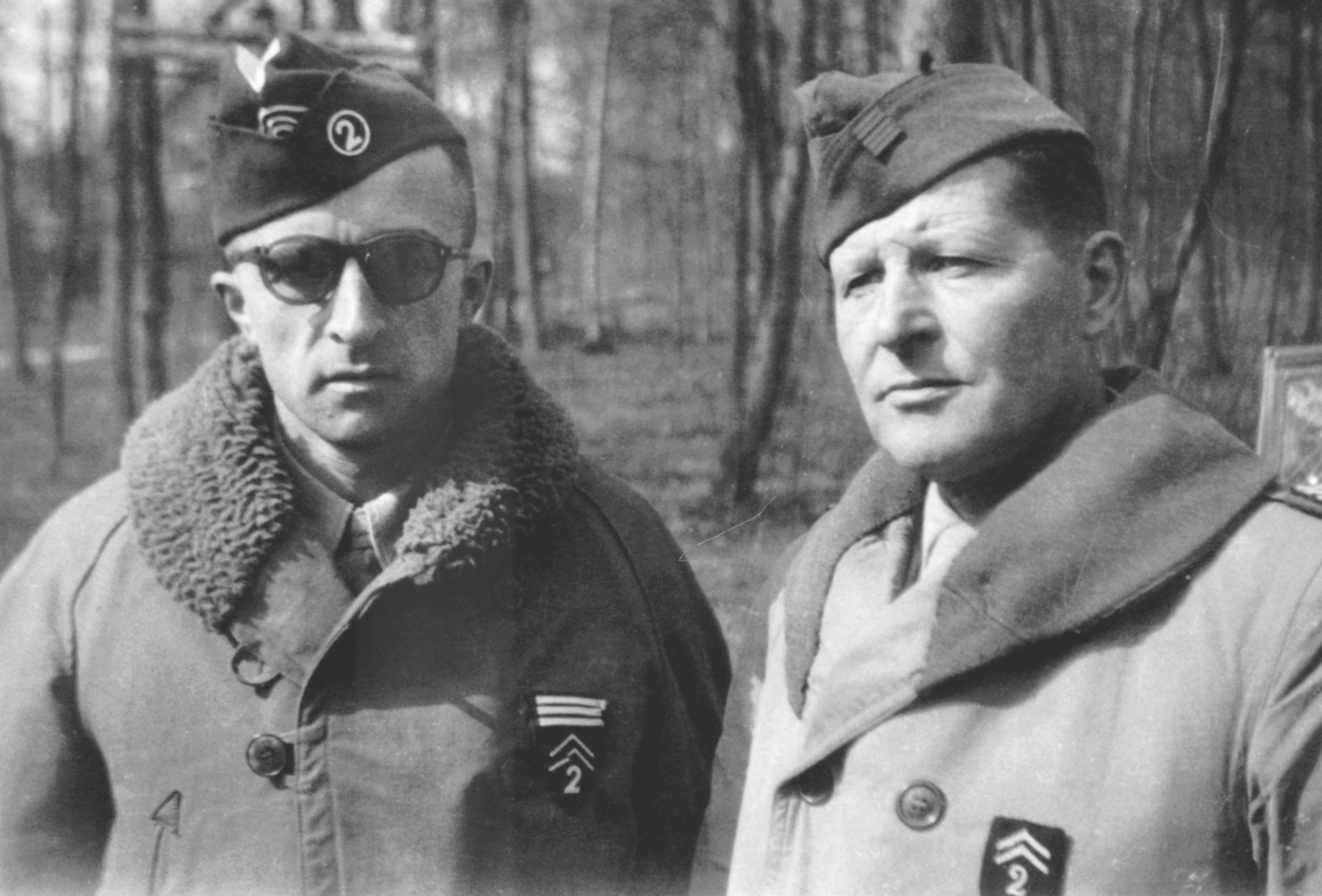 De droite à gauche : le colonel Bernardin Raugel et l'un de ses fils, le capitaine Jean Raugel, à l'occasion de la célébration de l'anniversaire du passage du Rhin en avril 1946